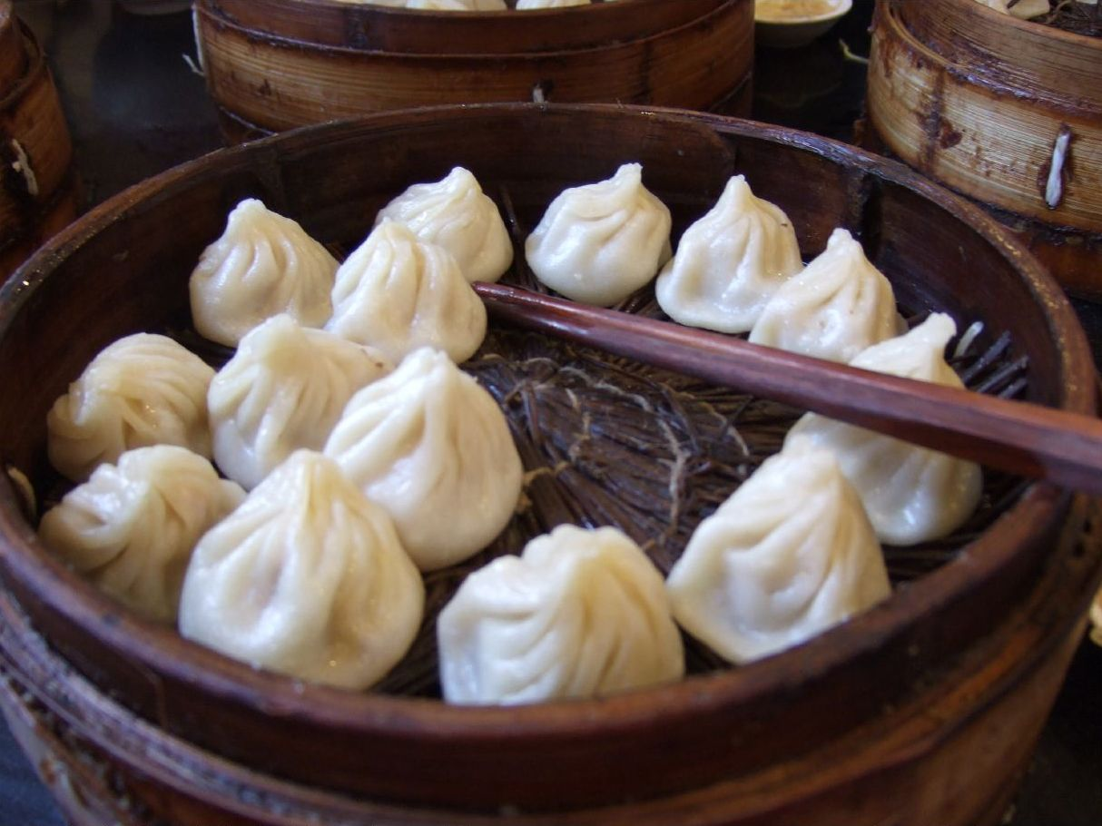 人多到不像話之『南翔包子;店』